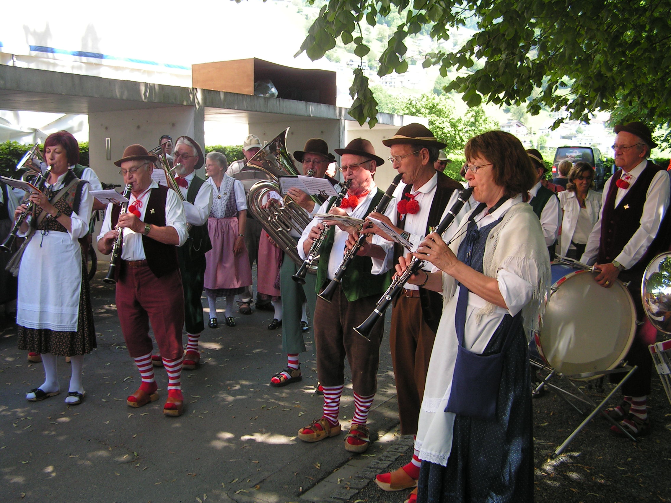 Tessiner Blasmusik